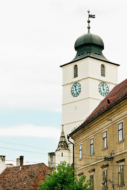 Ratturm in Hermannstadt Sonstiges: ...